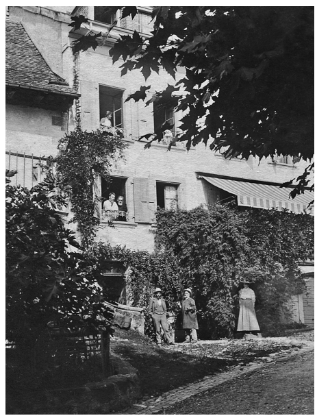 Егор Егорович Лазарев (псевдоним Бровинский; 12 апреля 1855, Самарская губерния — 23 сентября 1937, Прага) — народник, правый эсер, делегат Всероссийского Учредительного собрания, министр просвещения КОМУЧа, политэмигрант, редактор, автор мемуаров.